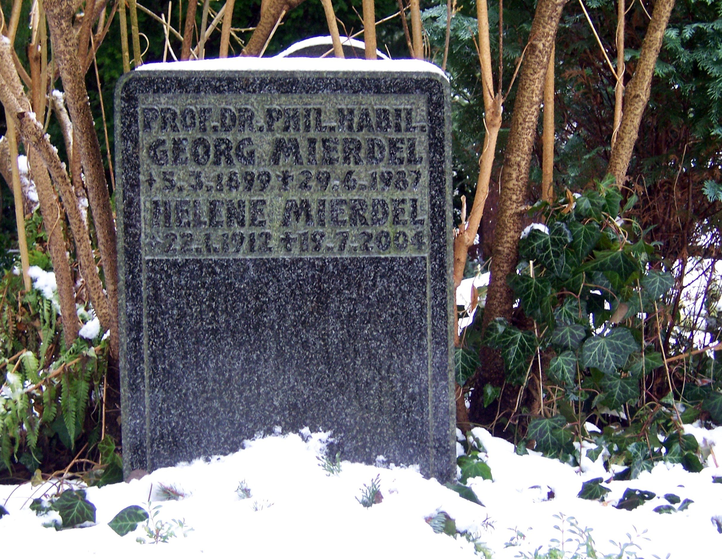 Grab des Wissenschaftlers Georg Mierdel auf dem Äußeren Plauenschen Friedhof in Dresden.